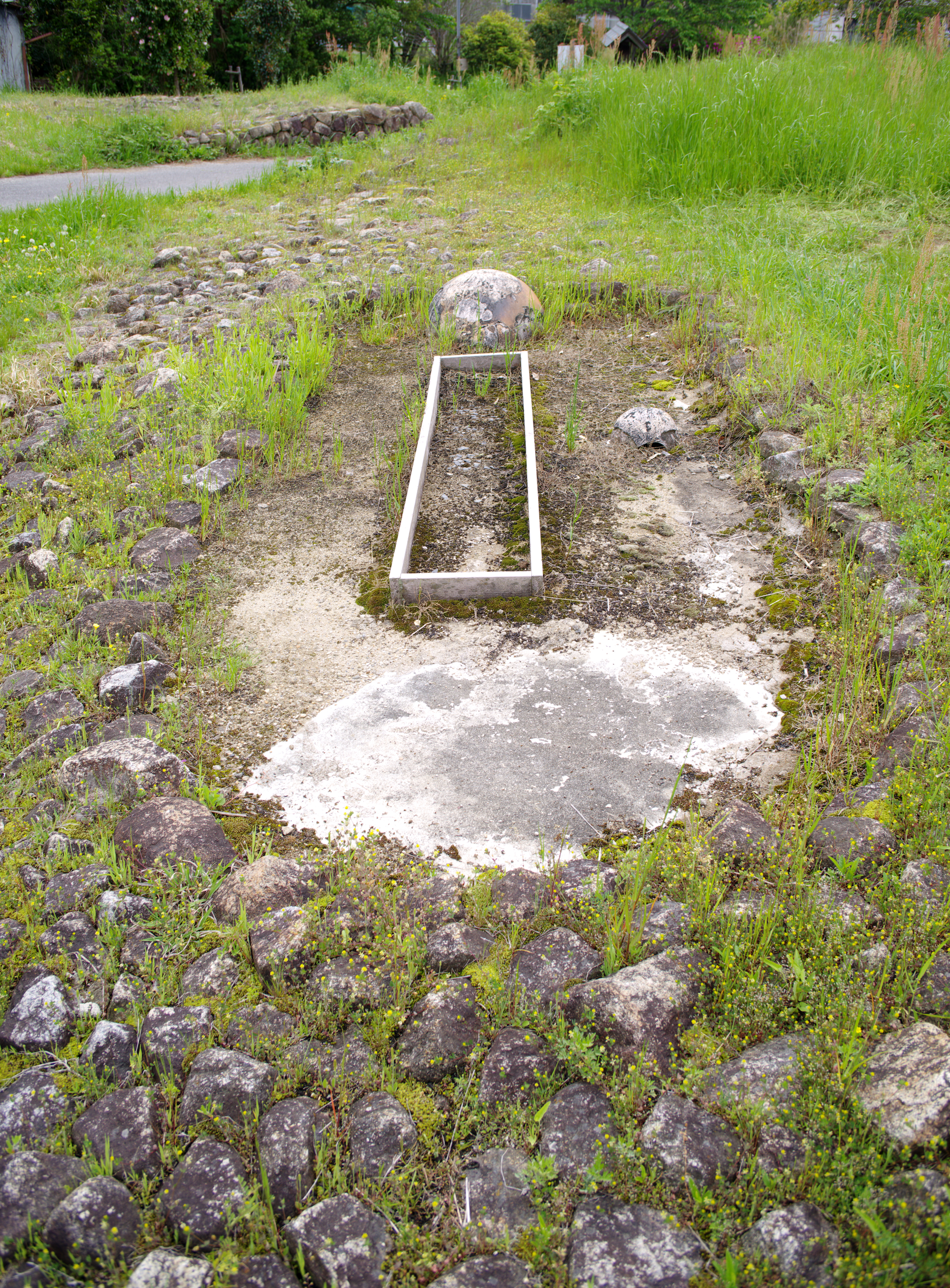 桜井市ホケノ山古墳の前方部木棺直葬墓（復元整備）